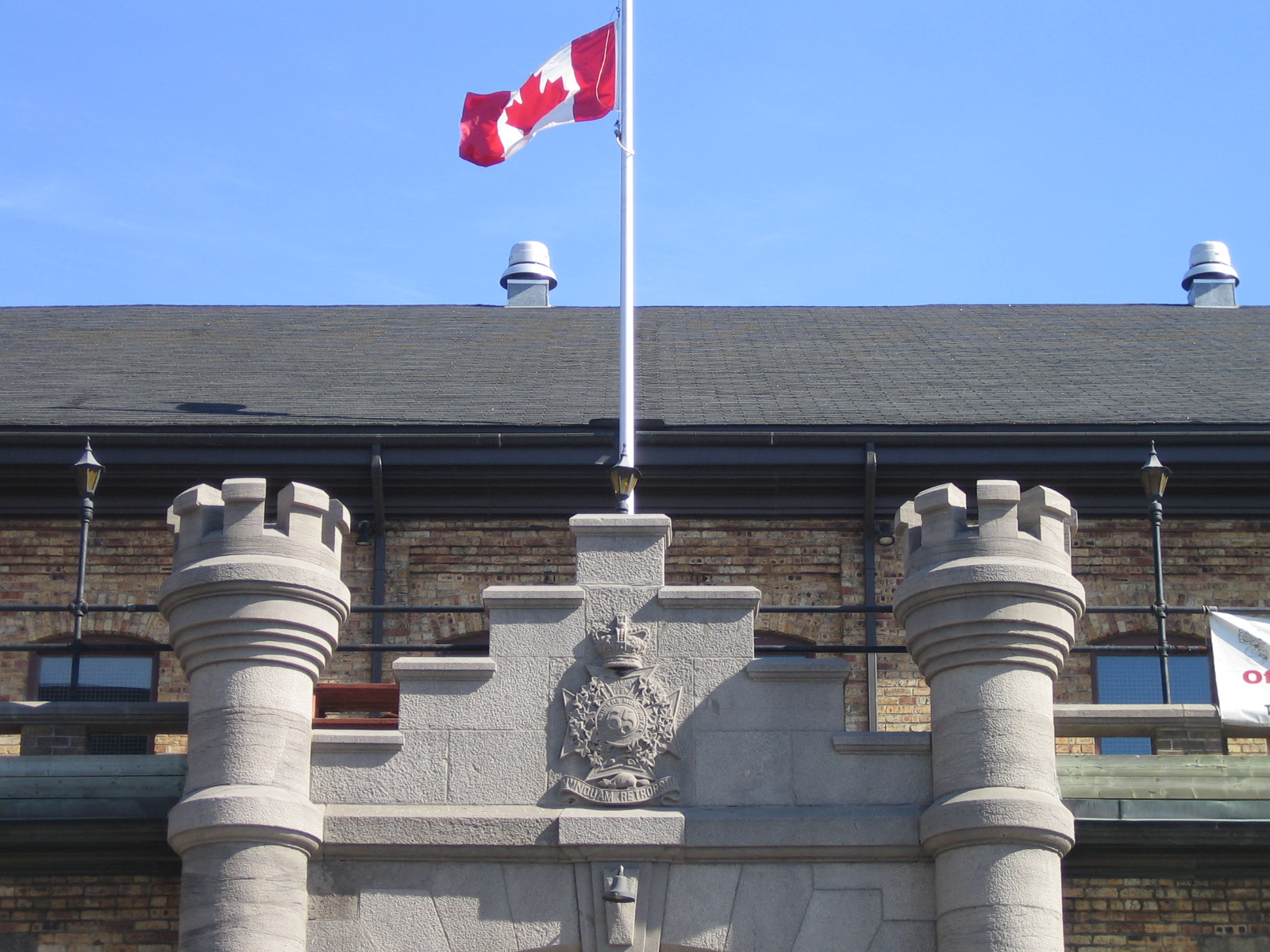 Fusiliers Mont-Royal (photo personnel 2005)